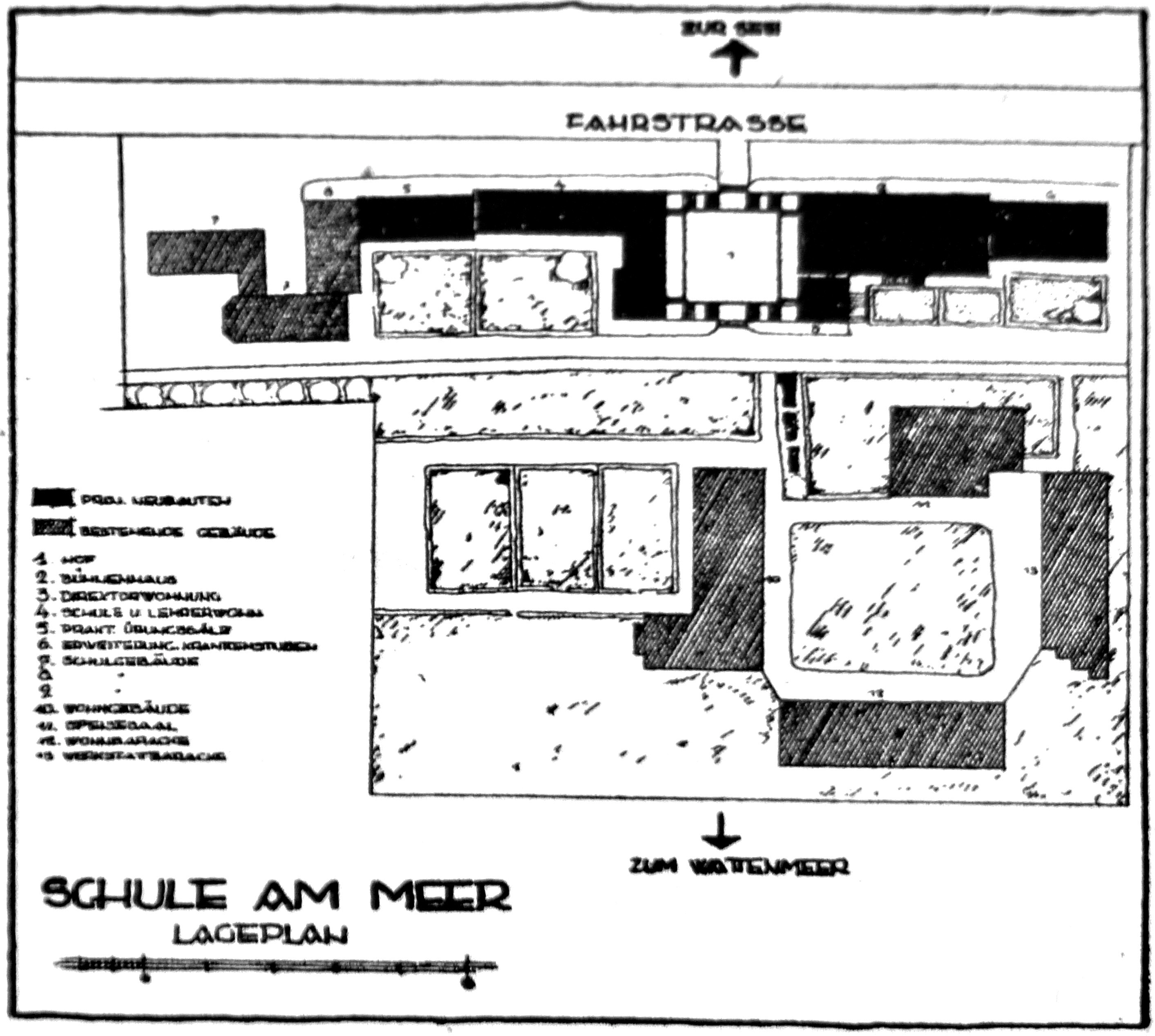 Lageplan der Schule am Meer im Loog auf Juist aus dem Jahr 1929. Die Skizze des Berliner Architekten Bruno Ahrends (1878–1948) zeigt schraffiert die Bestandsbauten und schwarz das in Planung befindliche Bauprojekt rund um das Funktionsgebäude der Bühnenhalle (auch: Hallenbau), deren angrenzende Gebäudeprojekte für weitere Bauabschnitte vorgesehen waren.